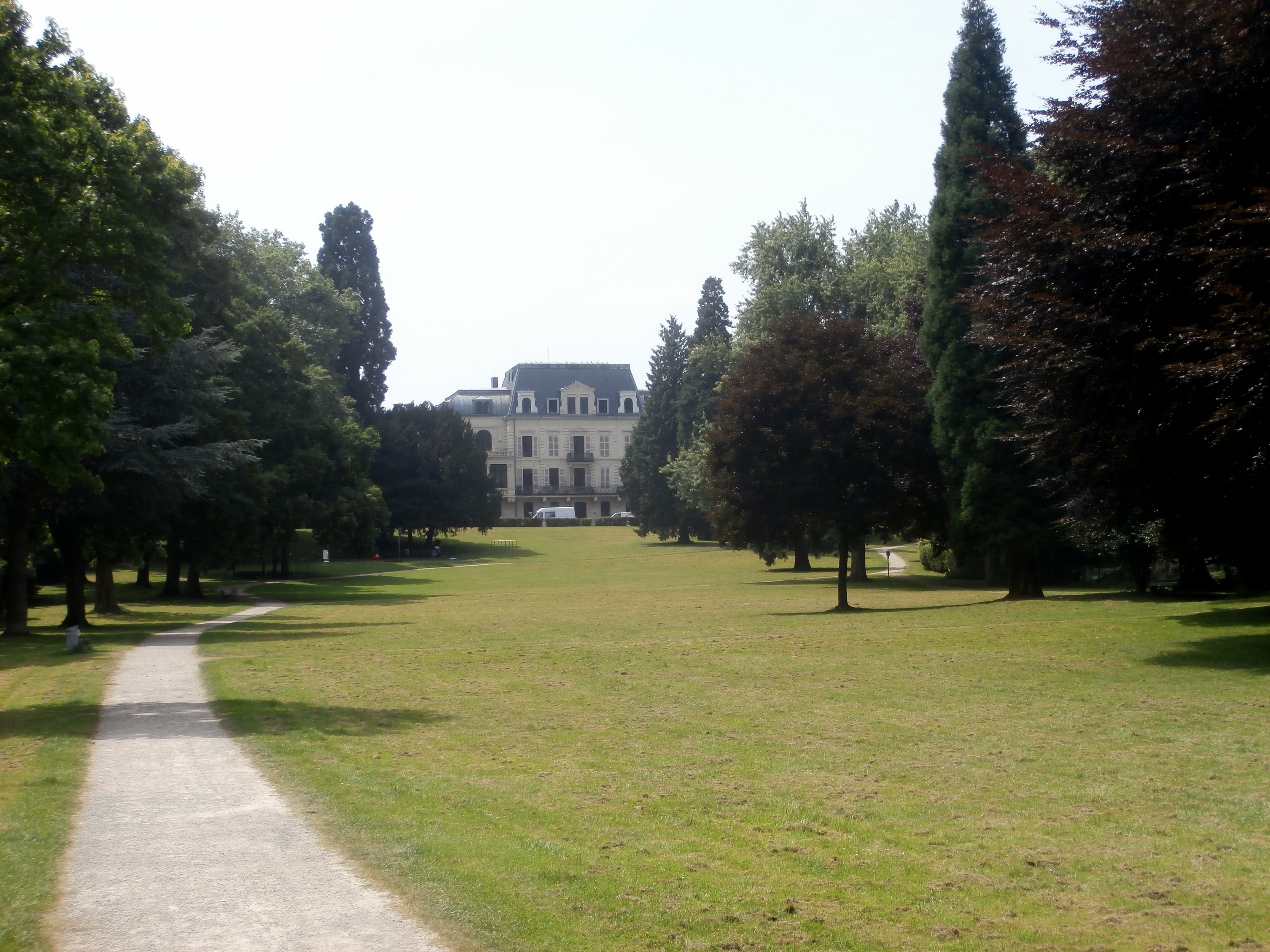 Drachensteinpark zwischen Nibelungenstraße und Mainzer Straße, Mehlem, Bad Godesberg, Bonn; im Hintergrund die Villa „Schnitzler“ (Mainzer Straße 210)